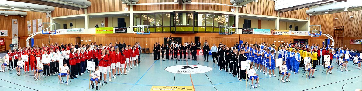 Alle Teams beim Season Opening 2007 in Marburg